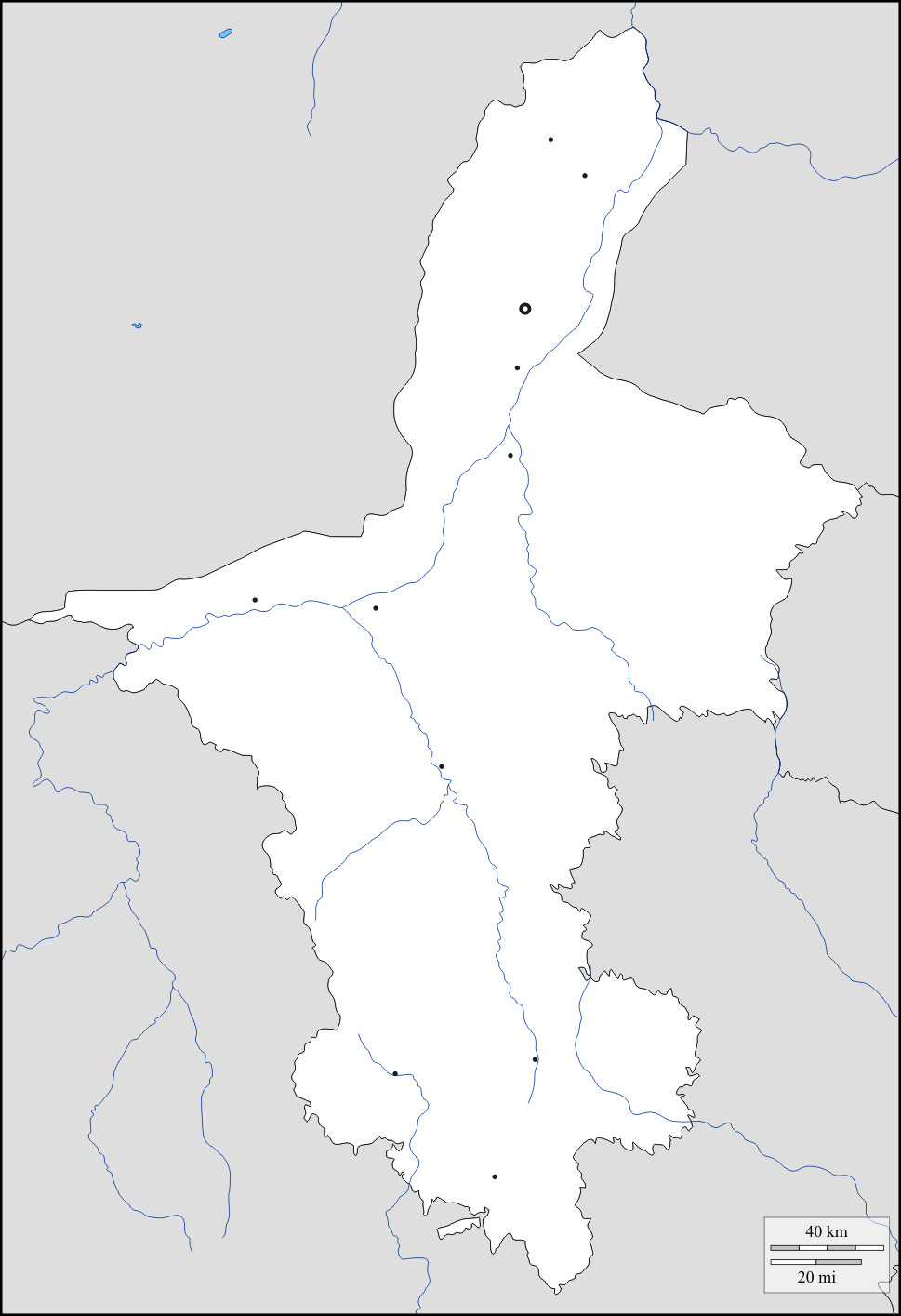 中国宁夏回族自治区地理位置图。来源：OpenStreetMap